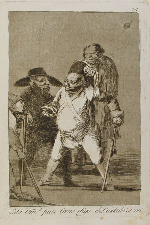 Capricho nº 76: Está vuestra merced... pues, como digo... ¡eh! ¡cuidado! si no... de Goya, serie Los Caprichos